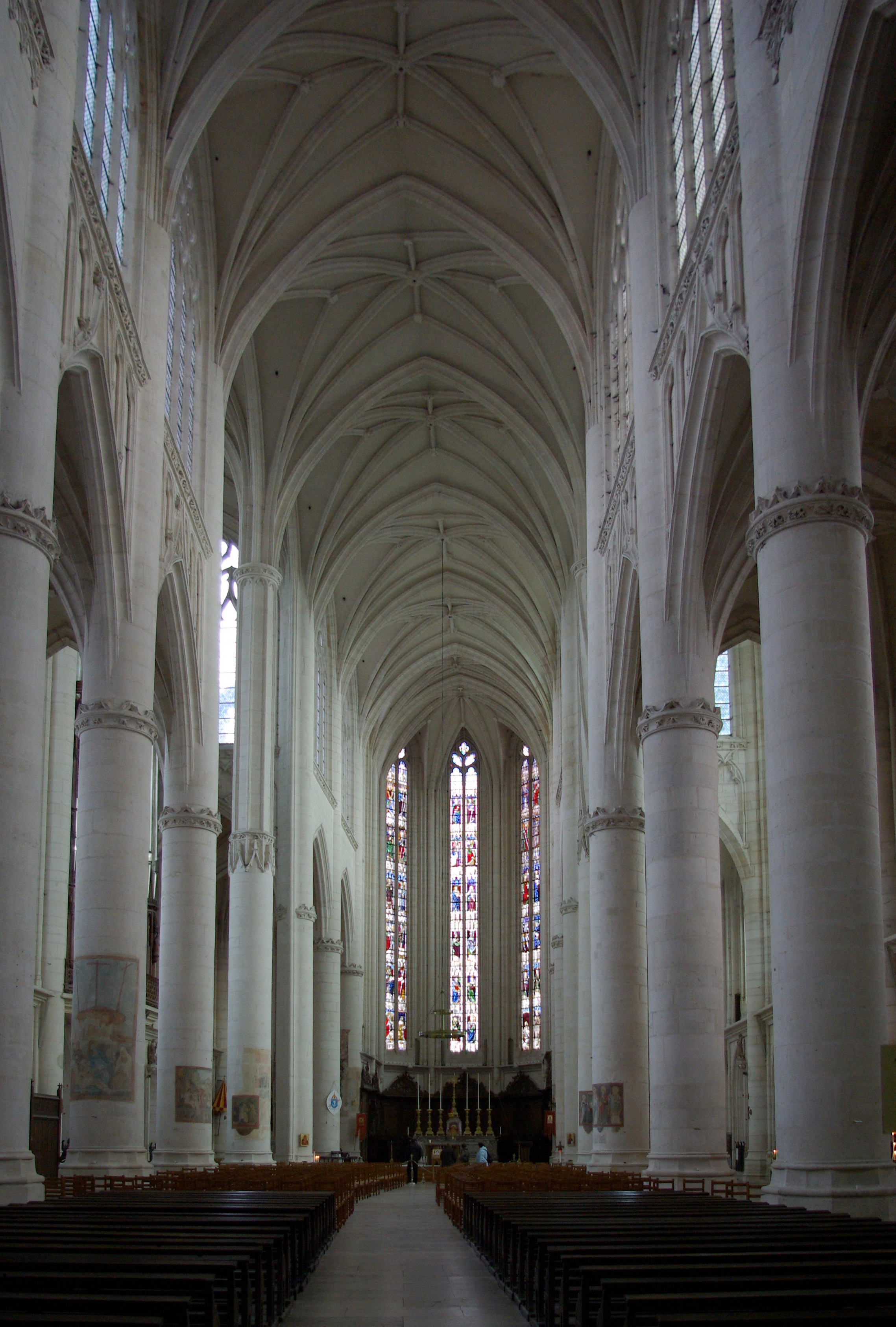 La nef de la basilique de Saint-Nicolas-de-Port